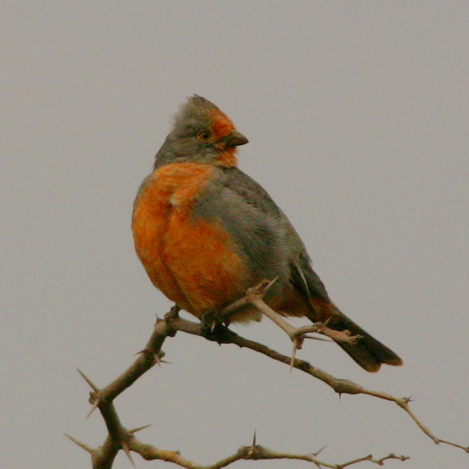 Cortarramas